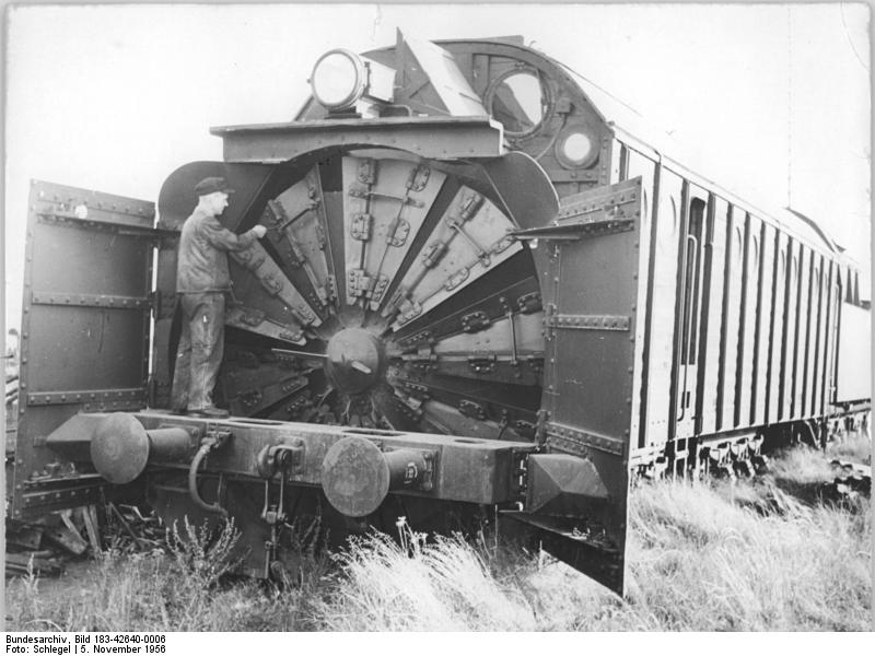 Chemnitz, Kontrolle einer Schneeschleuder Zentralbild Schlegel 5.11.1956 Eisenbahner von Karl-Marx-Stadt treffen Wintervorbereitungen. Die Eisenbahner des Bezirkes Karl-Marx-Stadt treffen gegenwärtig alle Vorbereitungen, um den erhöhten Anforderungen im Zugverkehr während der Wintermonate gerecht werden zu können. Nach einem Plan des Reichsbahnamtes wird in diesen Tagen die Einsatzfähigkeit der Schneeschleudern und Schneepflüge überprüft. UBz: Kollege Alfred Heidler vom Bahnbetriebswerk Karl-Marx-Stadt - Hauptbahnhof überprüft die Schneeschleuder.